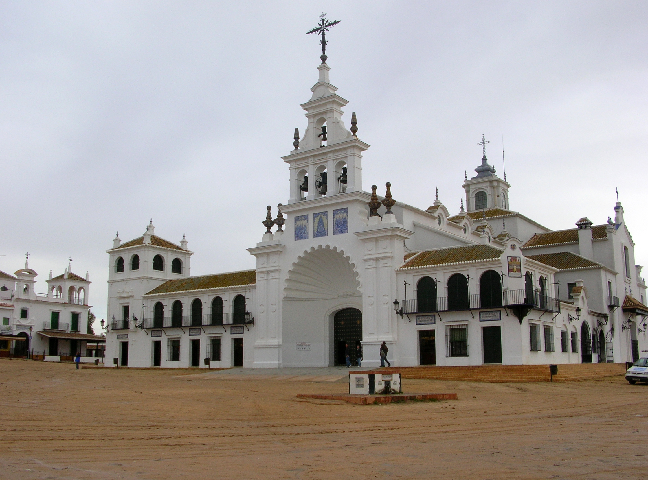 Eglise Notre Dame d'El Rocío, commune d'Almonte, Espagne